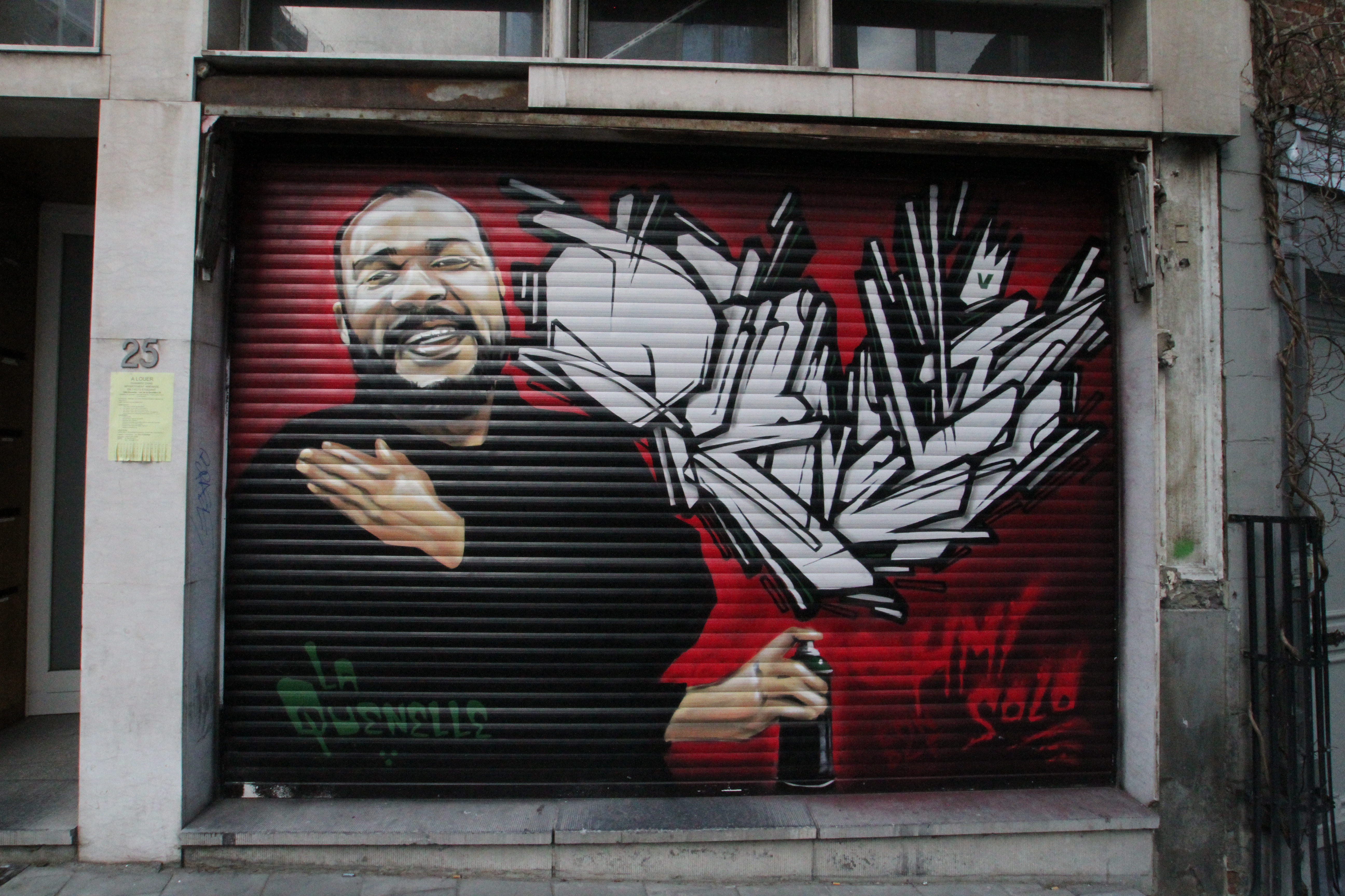 Graffiti de HMI Solo à Bruxelles, de Dieudonné faisant le geste de la Quenelle.